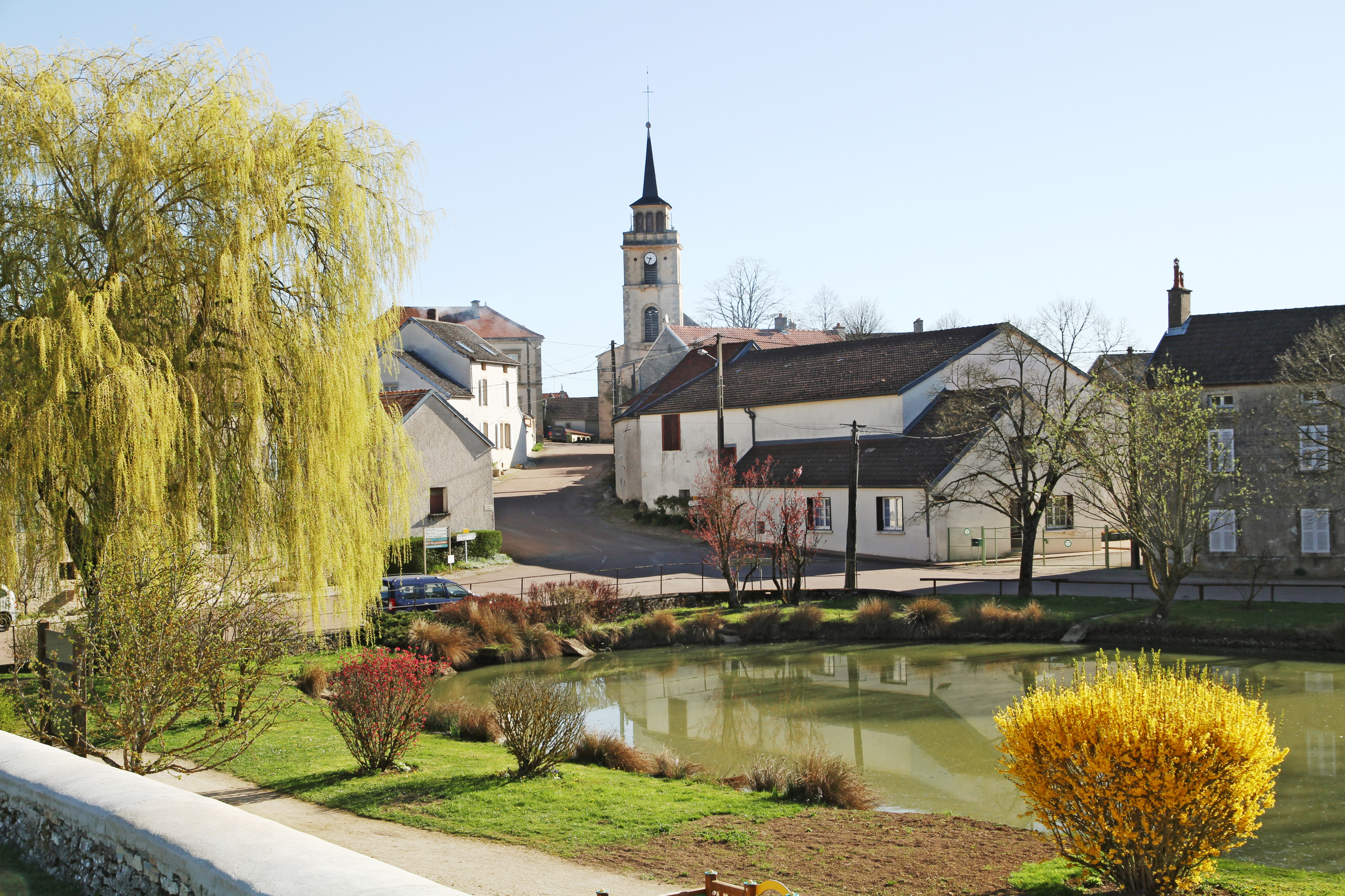 Mare et église de Francheville